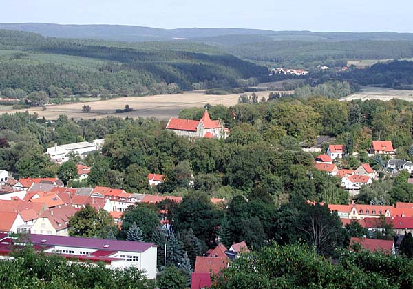 Kranichfeld, Blick ins Ilmtal (Original text: Tal der Ilm im Hügelland der Ilm-Saale-Platte, vorn links: Schule Kranichfeld, Mitte: Niederburg)